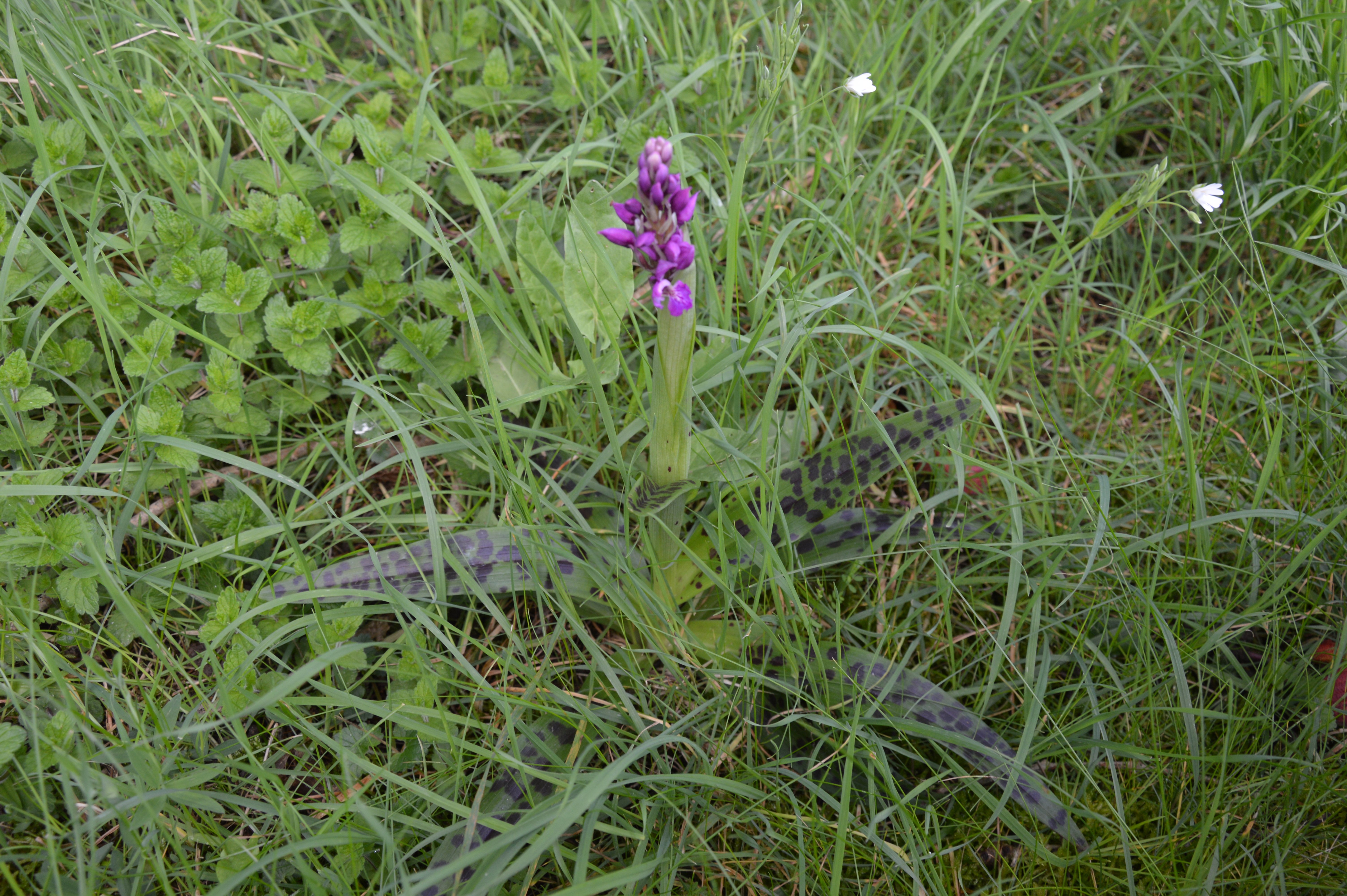 Flore de la vallée de la Divatte (France 44)